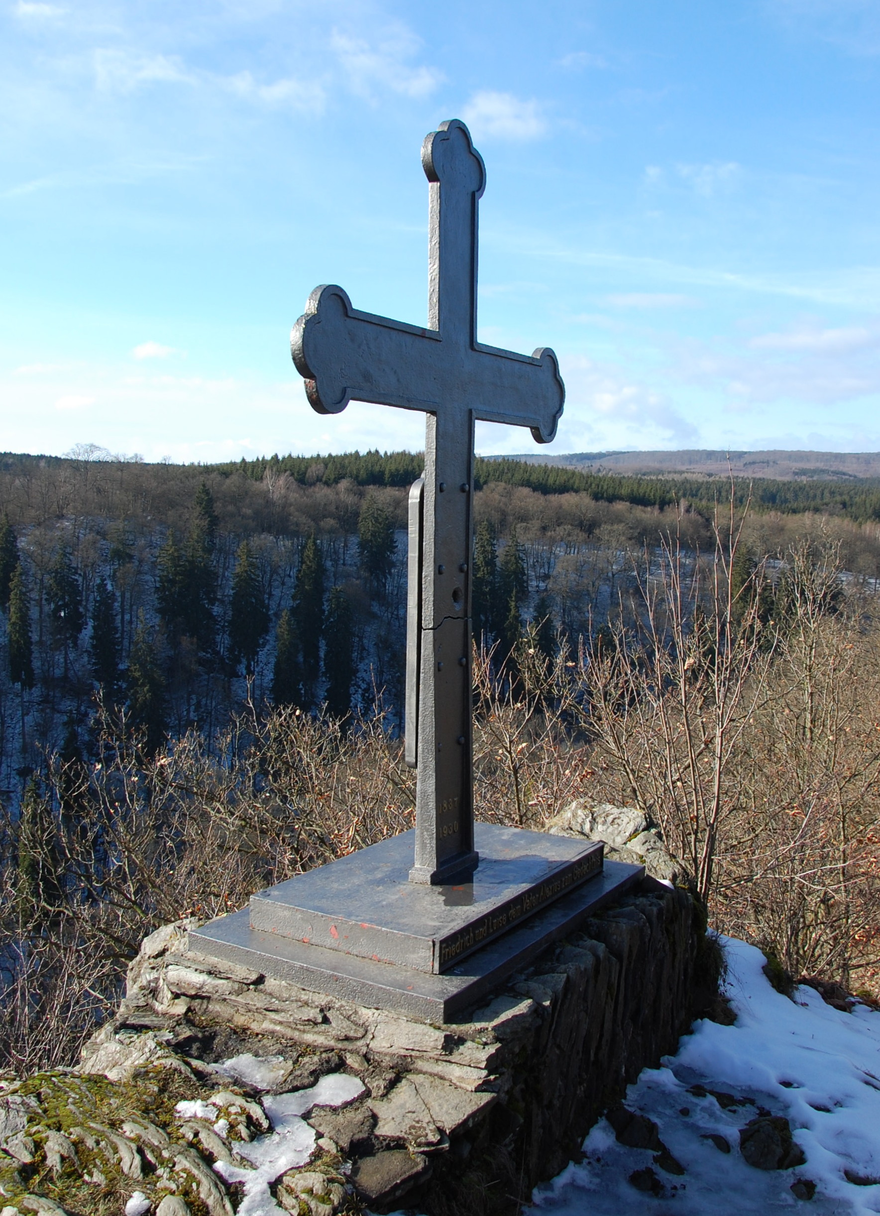 Gedenkkreuz an der Mägdetrappe